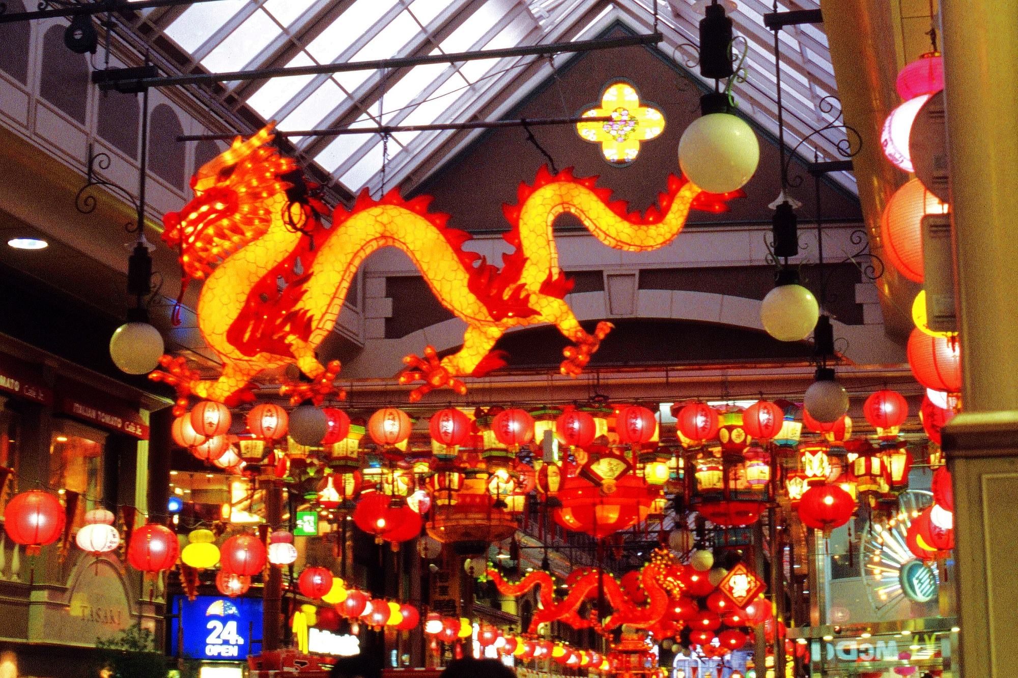 長崎市で行われる「長崎ランタンフェスティバル」浜町の様子。2010年2月撮影。OLYMPUS OM30＋OM ZUIKO 28/3.5 RXP